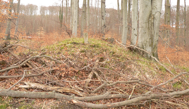 Wurtgarten